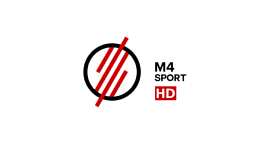 Lógó HD adás közben.